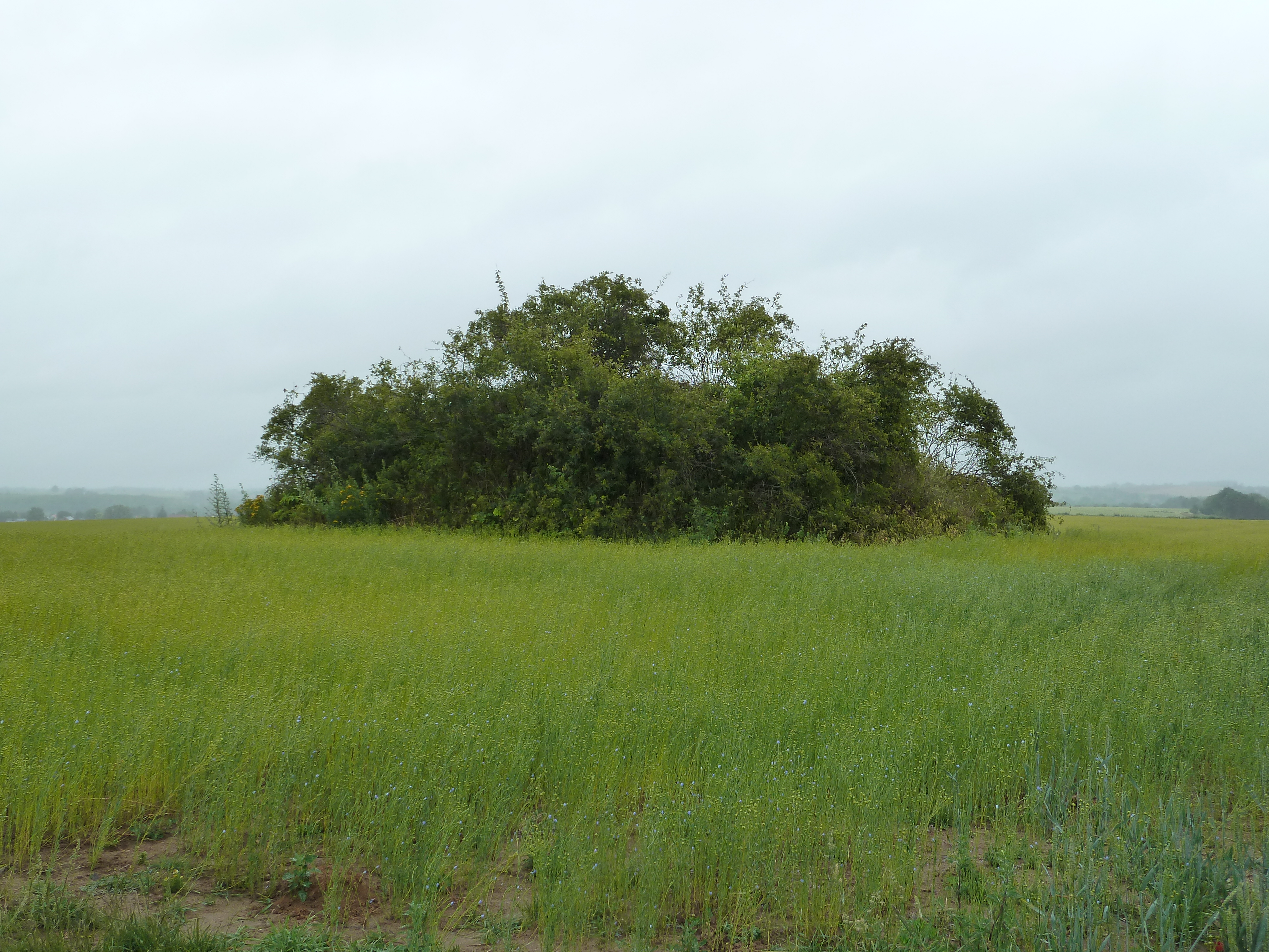 Tombe d'Yve, Braives, Belgique